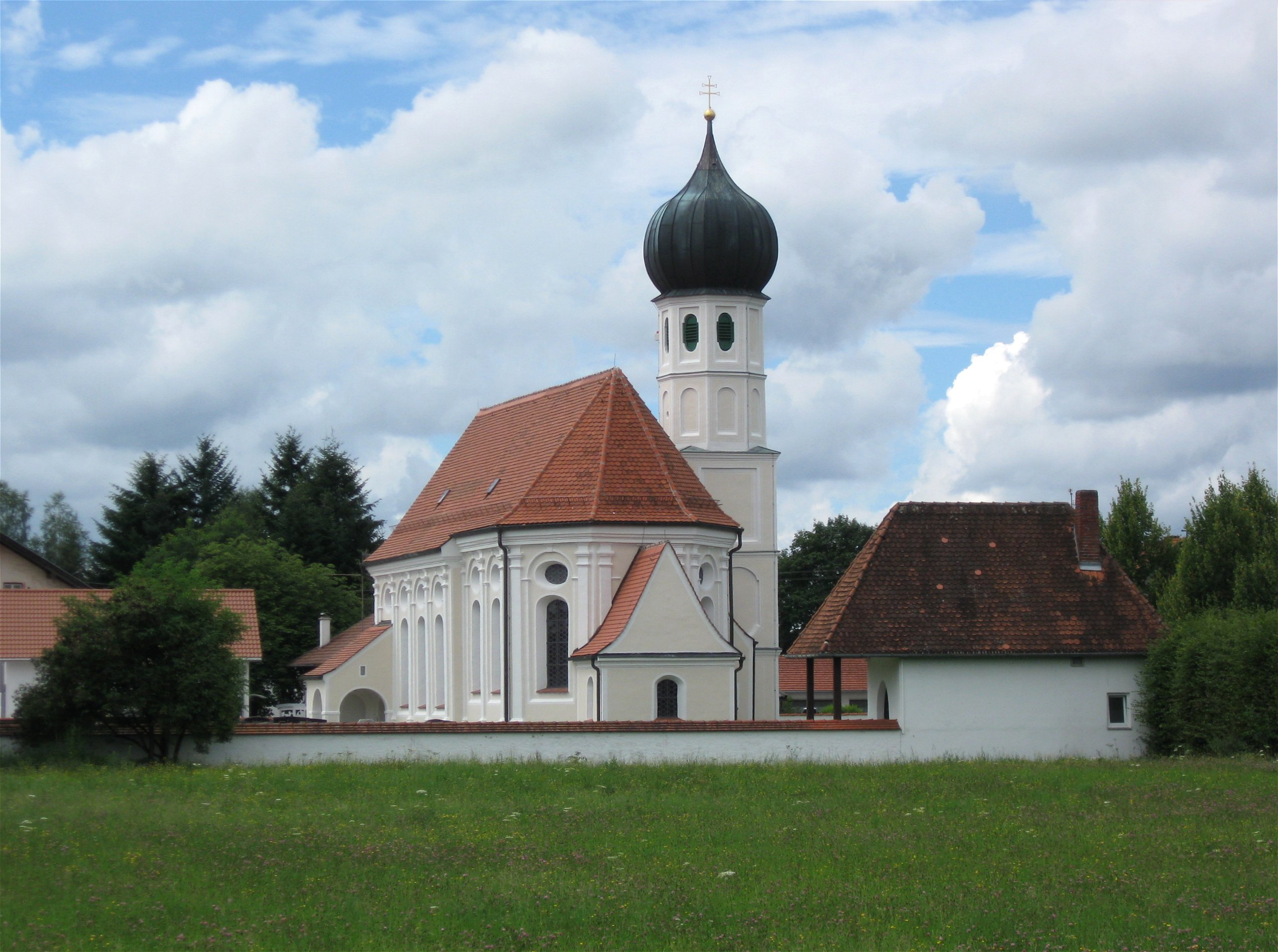 Faistenhaar; Kath. Filialkirche St. Peter und Paul, barocker lisenengegliederter Saalbau mit eingezogenem polygonalem Chor auf Grundlage einer mittelalterlichen Kirche, seitlich angefügtem Zwiebelturm und Sakristei am Chorscheitel, erbaut 1683- 1735, Sakristei 1750, Turm mittelalterlich; mit Ausstattung. D-1-84-114-9